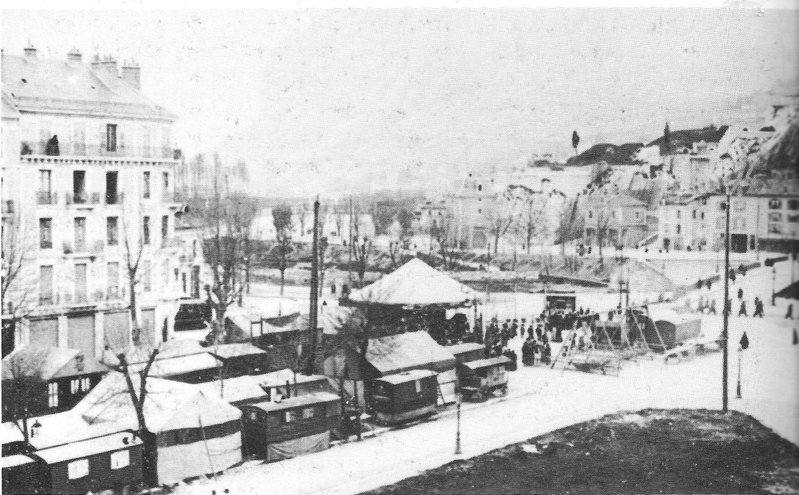 La foire des Rameaux au tout début du XXe siècle sur le cours St André à Grenoble (actuel cours Jean jaurès, près la place Hubert Dubedout). On distingue la porte de France au loin !